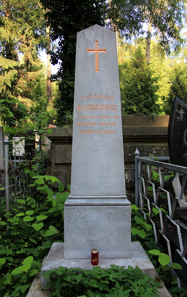 Galicijos knygų leidėjo Adomo Dominyko Bartuševičiaus antkapis Lvovo Lyčiakovo kapinių 1863 m. sukilėlių kalnelyje